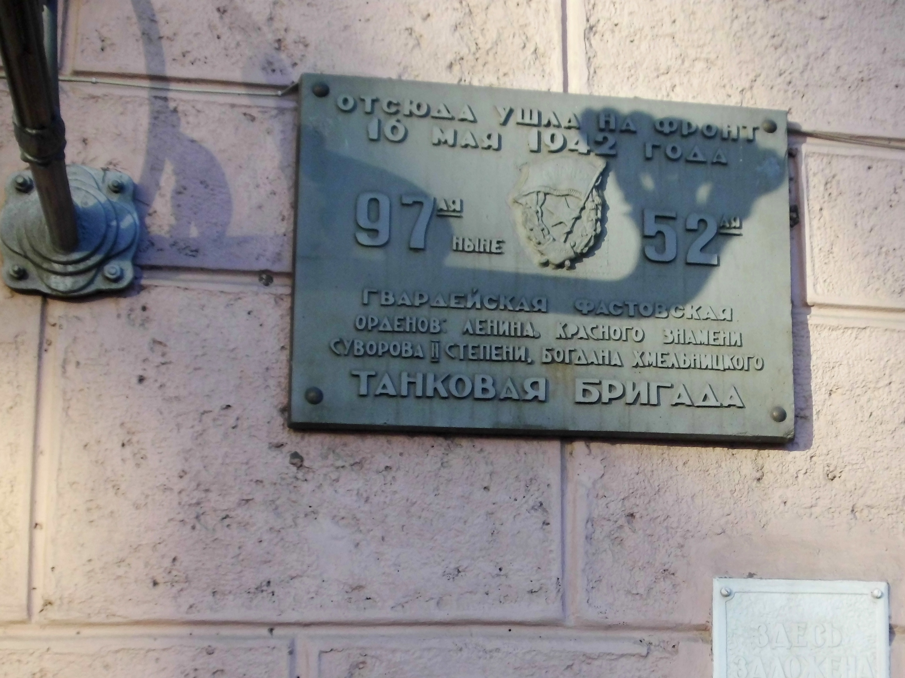 Здание, в котором формировалась 97-я танковая бригада в 1942 году: проспект Ленина, 13 (справа от Комсомольской площади, ныне размещается гимназия № 48), Челябинск, Челябинская область. Памятная табличка у входа на переднем (восточном) фасаде здания.